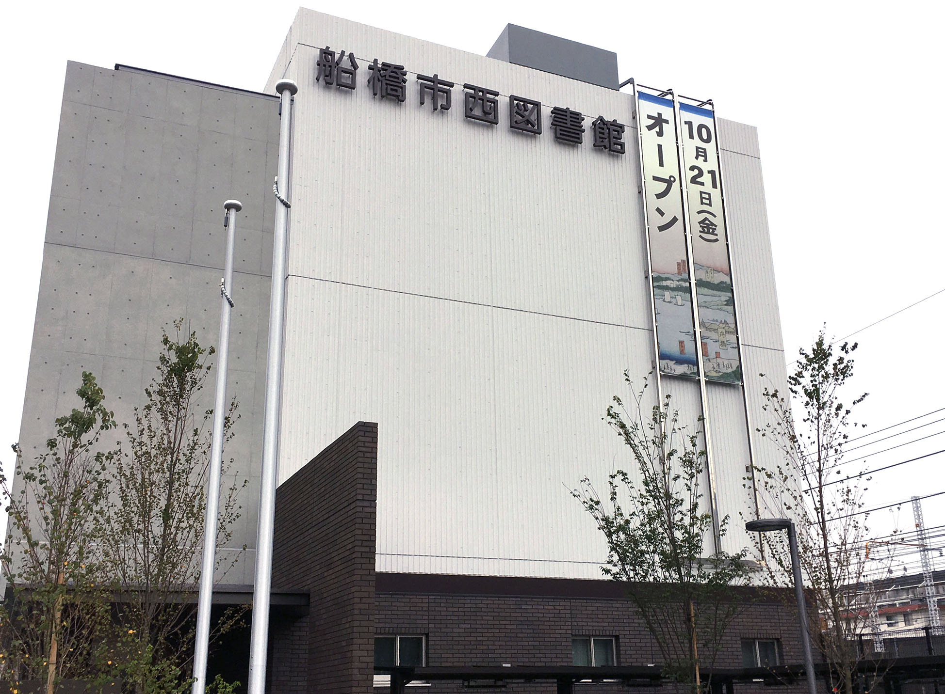 船橋市西図書館(2016年10月21日オープン)